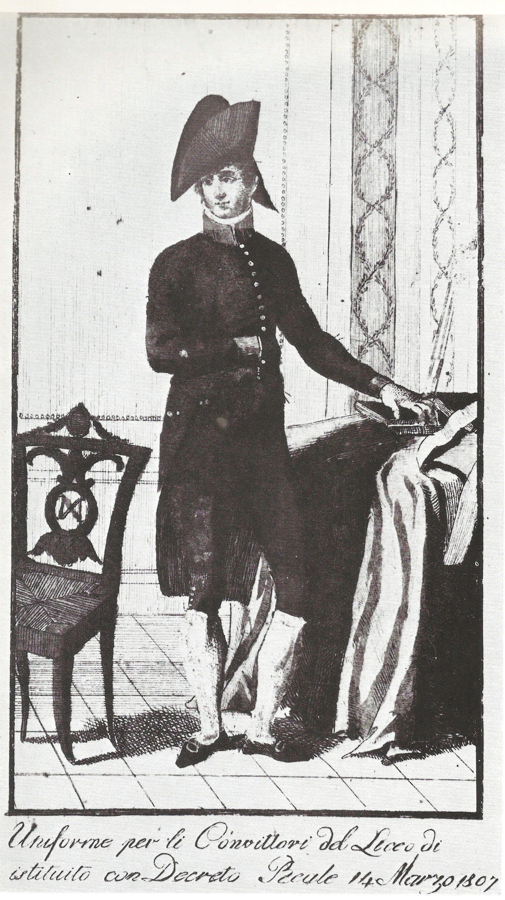 "Uniforme per li Convittori del Liceo istituito con Decreto Reale 14 Marzo 1807", Biblioteca Civica di Verona, Raccolta di stampe (da "Cultura e vita civile a Verona", a cura di G.P. Marchi, Verona 1979).